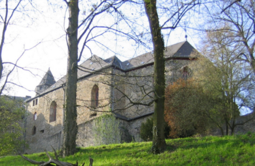 Schlosskirche von Schloss Braunfels